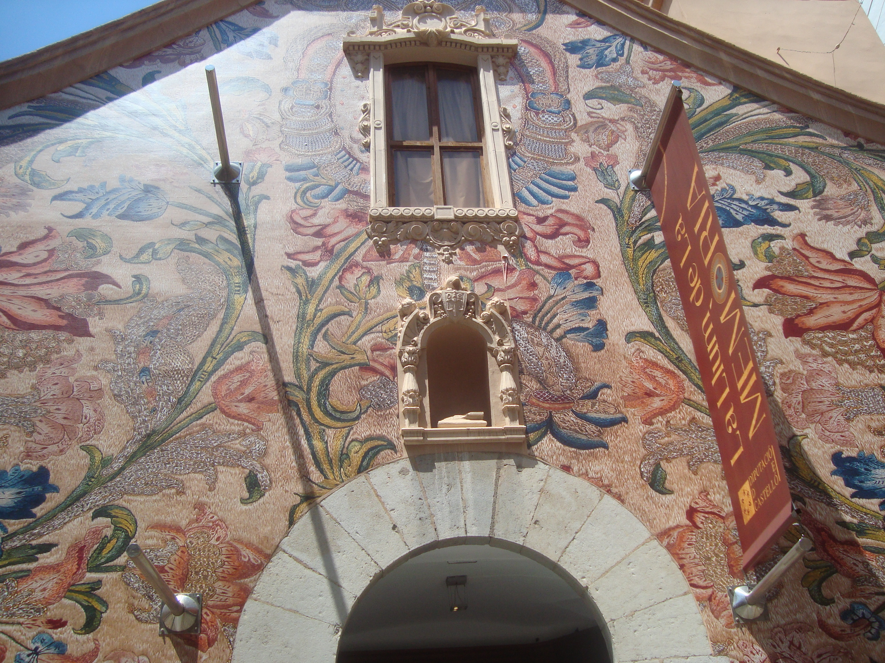 Església de Sant Miquel (Castelló de la Plana) 05.040-012.